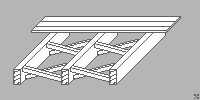 Abkreuzung